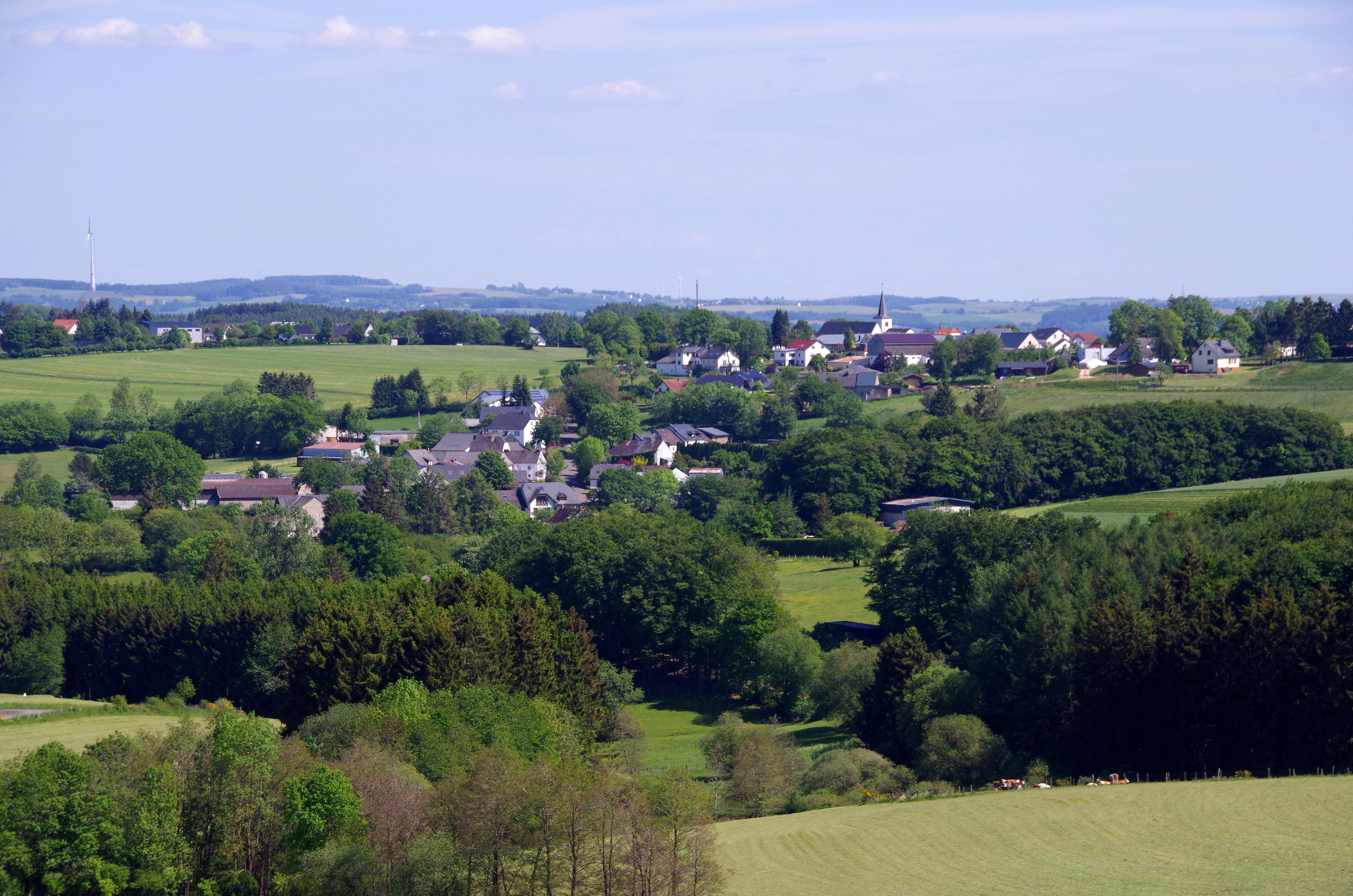 Habscheid, Blick von Nordwesten